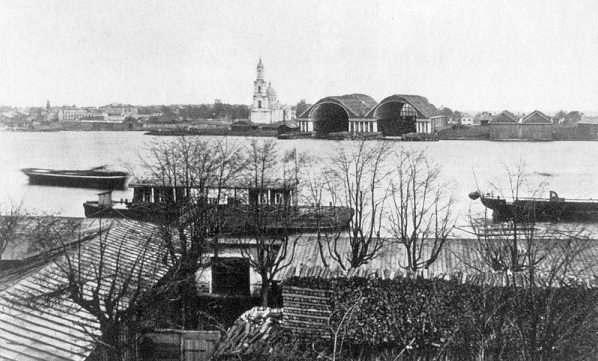 Охтенские верфи в 1880-1890 гг